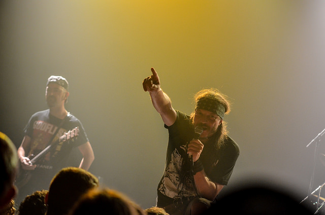 Blockheads au Rock Your Brain le 18-10-2014